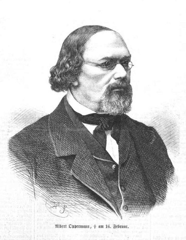 Heinrich Albert Oppermann, deutscher Schriftsteller und Politiker im 19. Jh.